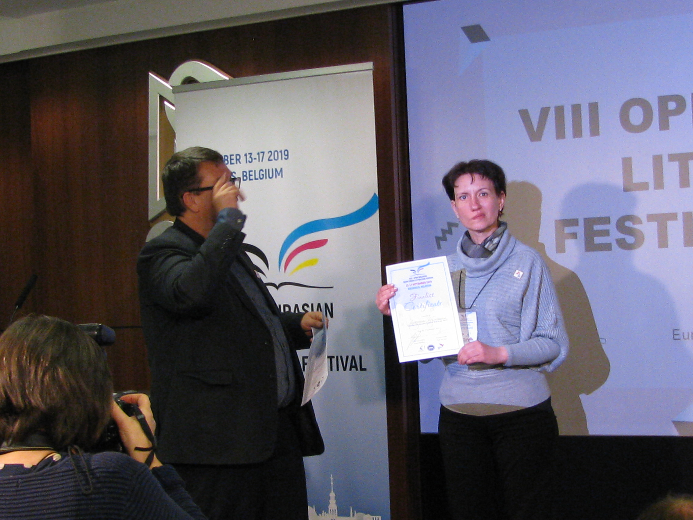 Международный литературный фестиваль "Open Eurasia-2019" в Брюсселе